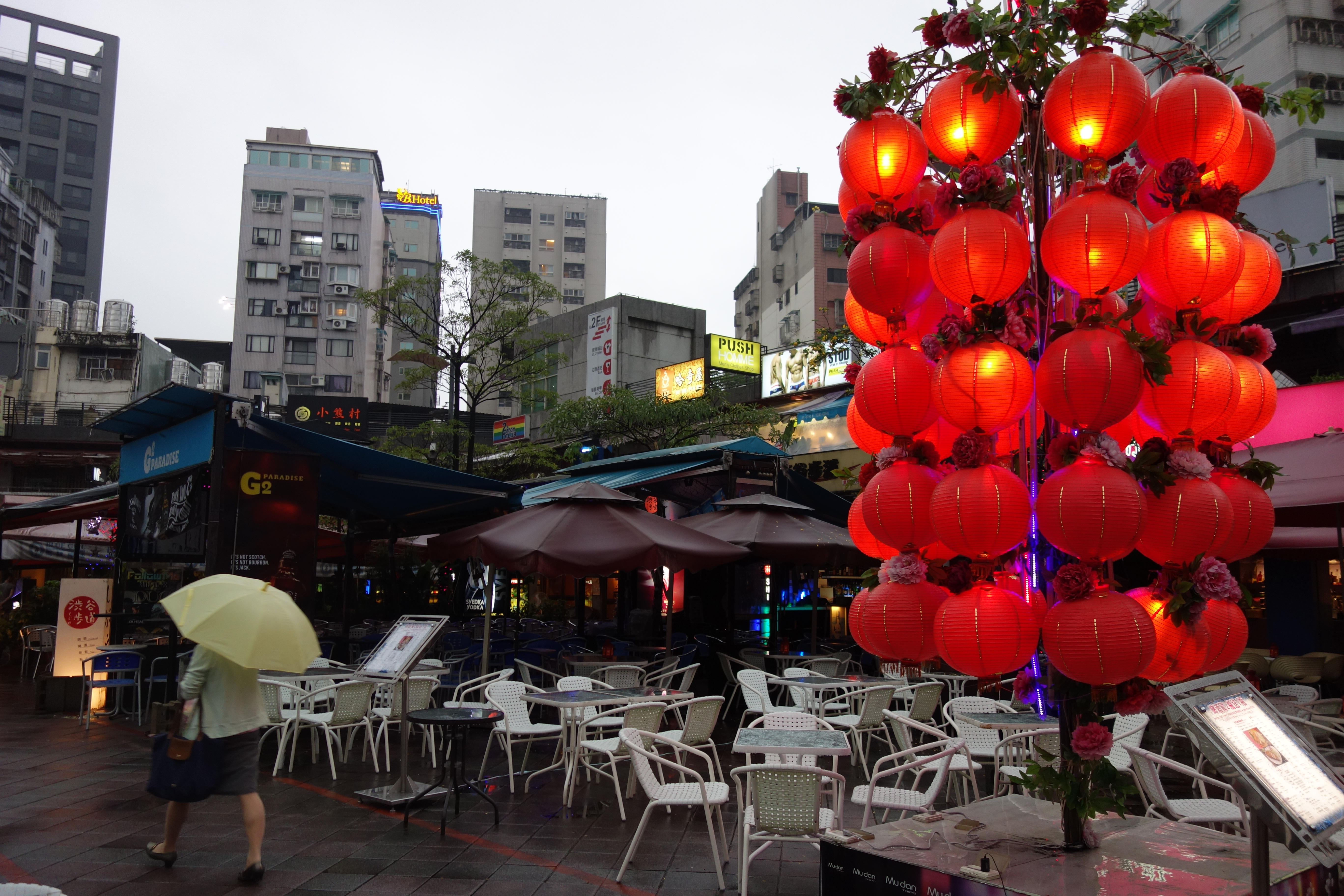 西門紅楼南広場